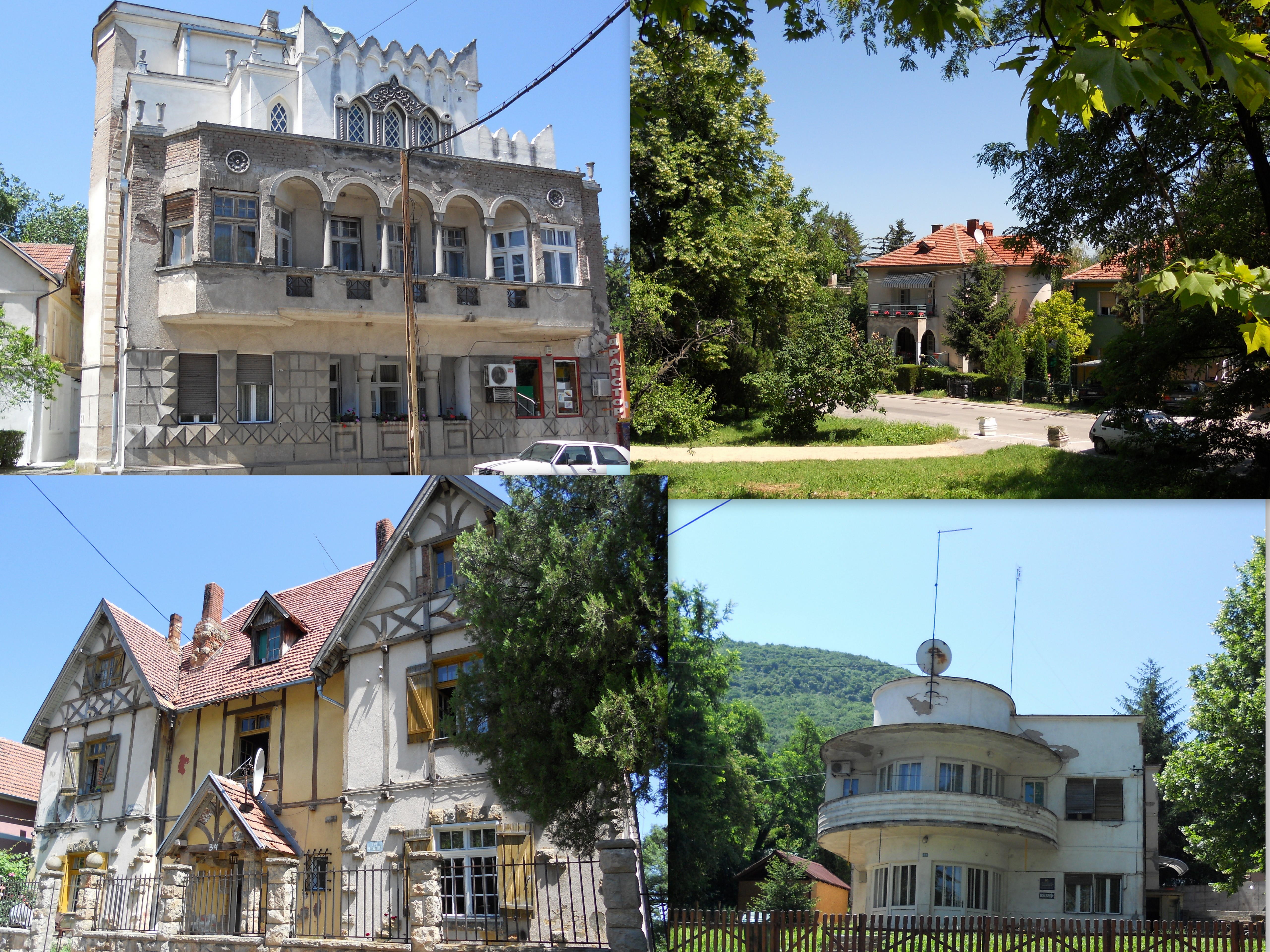 Arhitektura Niške Banje između dva Svetska rata. Autor: dr Milorad Dimić, Niš, Srbija. 18. jun 2012.